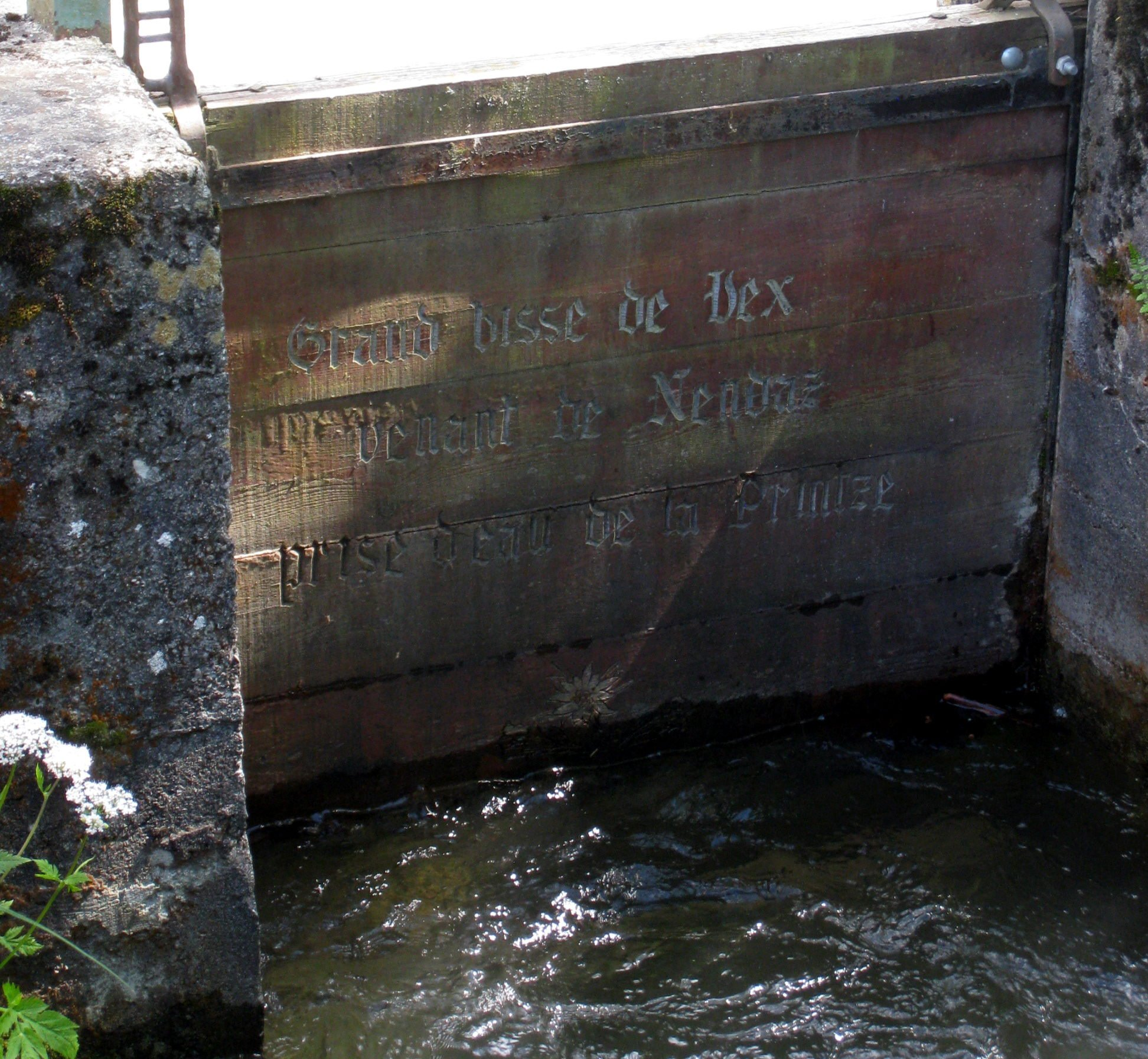 Détail de la prise d'eau du Grand Bisse de Vex sur la Printze. On peut lire sur le panneau en bois de l'écluse: "Grand Bisse de Vex, venant de Nendaz, prise d'eau de la Printze".